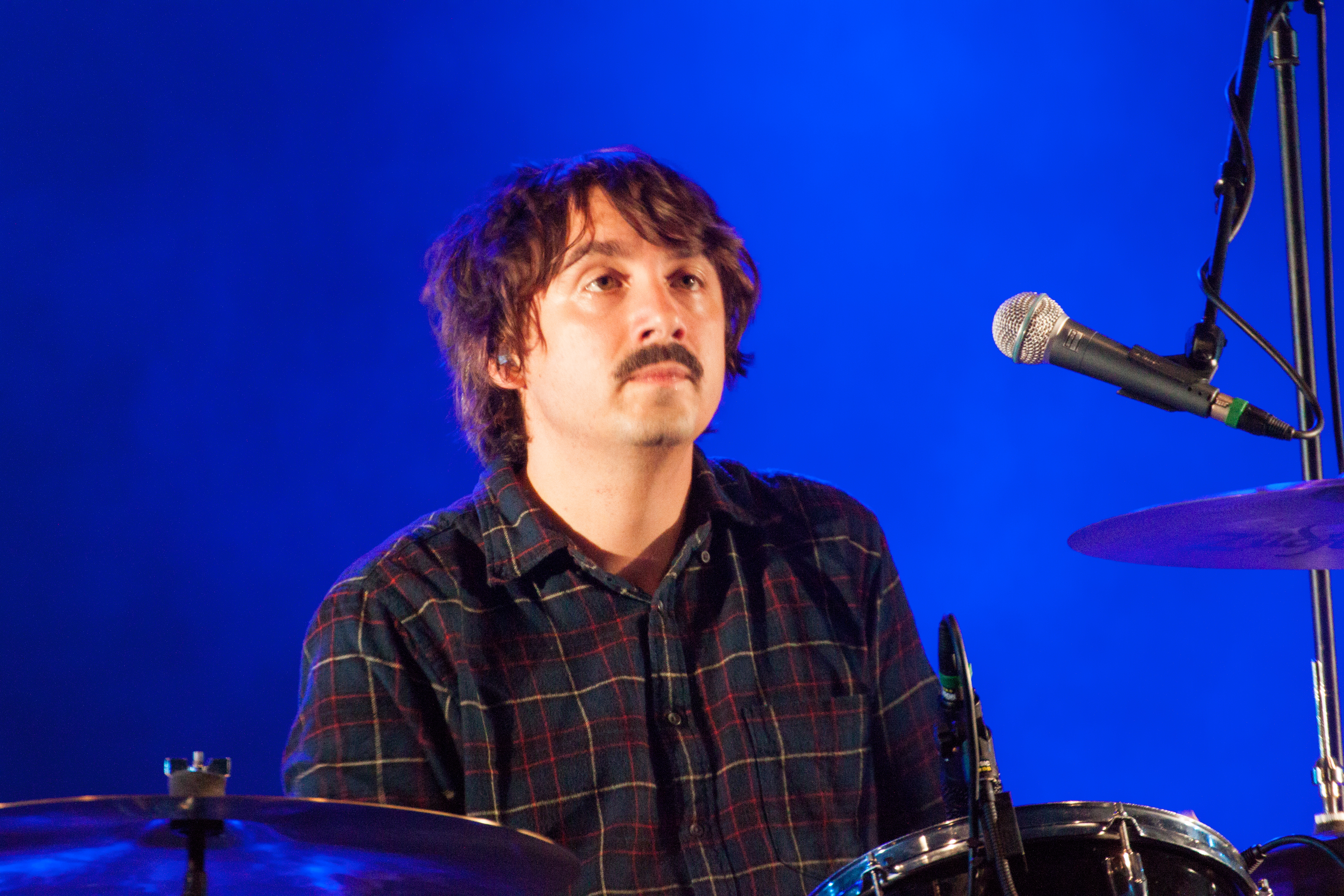 Pierre Leroux du groupe Housse de Racket lors du Mouv'Live de Grenoble en juillet 2012